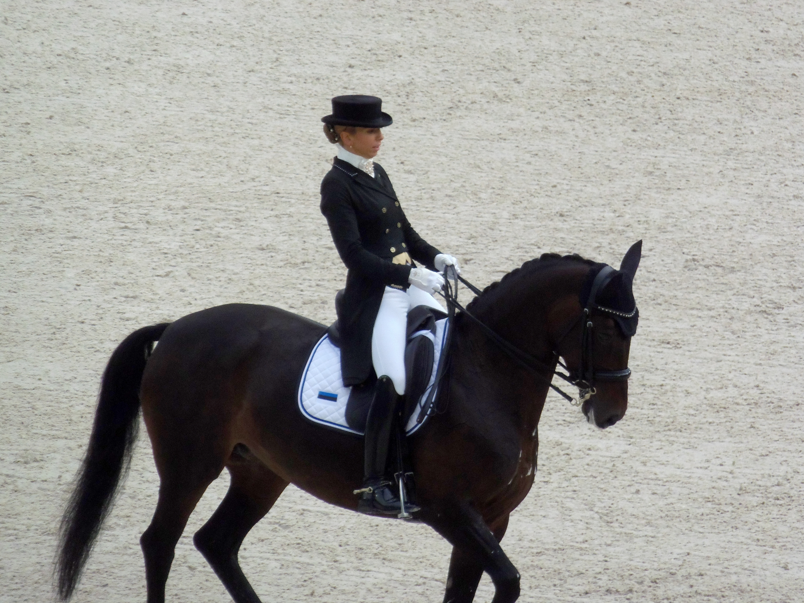 Dina Ellermann en selle sur Landy S Akvarel lors des Jeux équestres mondiaux, le 26 août 2014 au stade d'Ornano à Caen (Normandie, France).